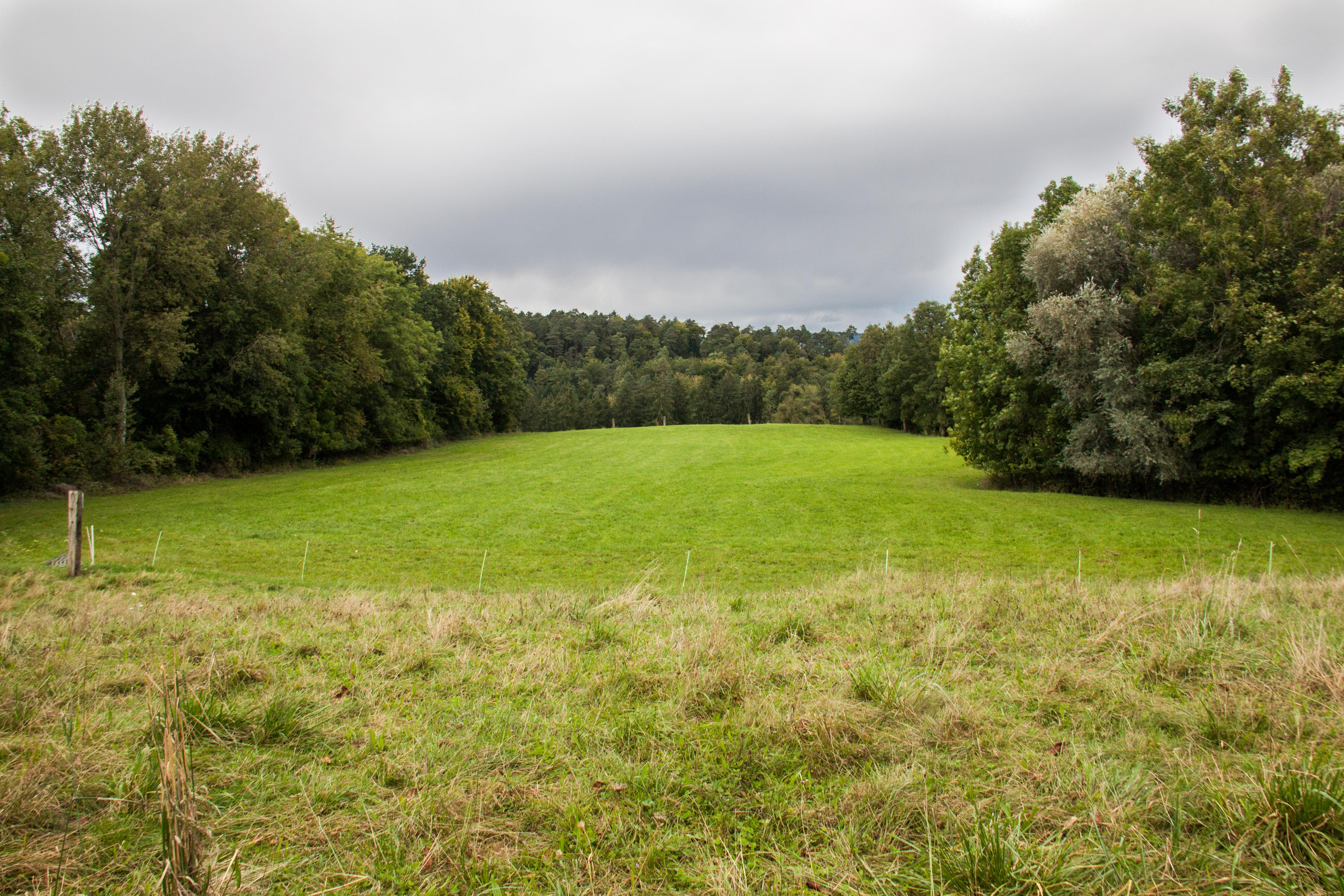 Toos-Waldi (bronzezeitliche Höhensiedlung), Schönholzerswilen Blick aufs Hochplateau KGS-Nr: 5153